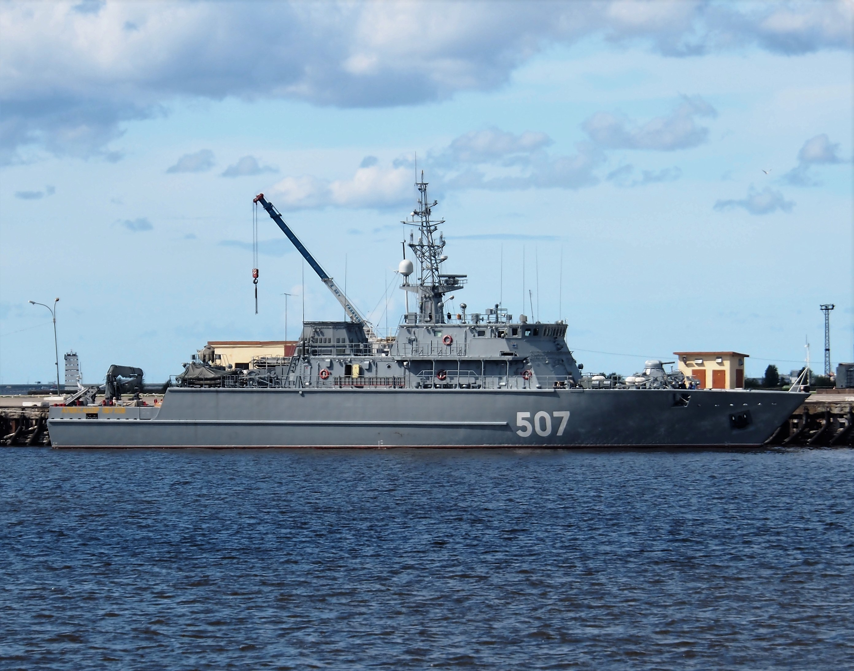 Port of Kronstadt.